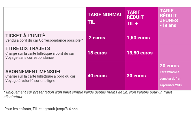 Tarifs TIL